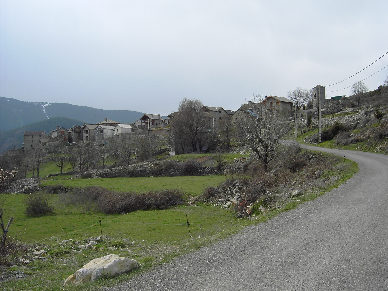 Vista general de Nerín, perteneciente al municipio sobrarbés de Fanlo. Por estar cerca del Cañón de Añisclo se ha convertido en uno de los lugares turísticos por excelencia de la zona.